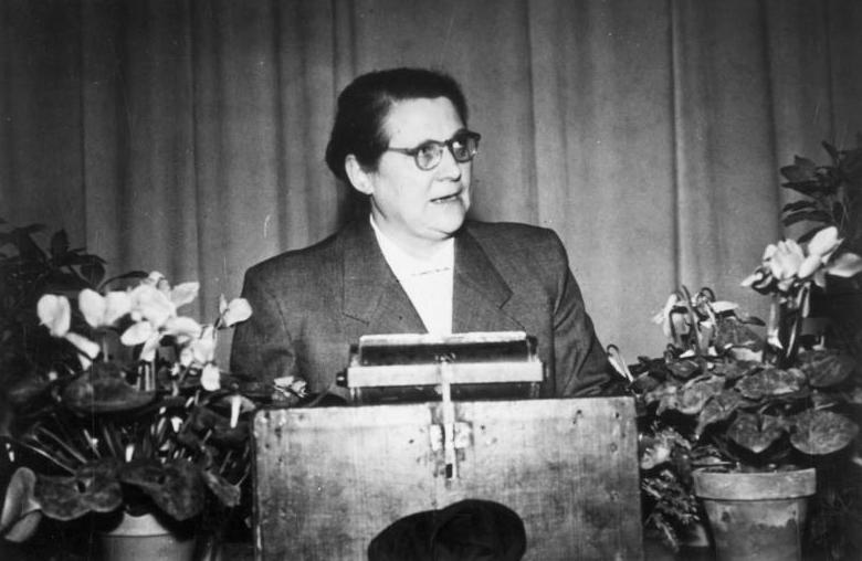 Zentralbild/Herberg 6.12.1952 Gründungsversammlung der "Gesamtdeutschen Volkspartei" am 30.11.1952 in Frankfurt/Main Am 30.11.1952 fand in Frankfurt am Main die Gründungsversammlung der "Gesamtdeutschen Volkspartei" statt. UBz: Die Bonner Bundestagsabgeordnete Helene Wessel, früher Vorsitzende der Deutschen Zentrumspartei erklärte auf der Gründungsversammlung: "Der Generalvertrag vertieft nicht nur die Spaltung Deutschlands, sondern auch die Europas. Denn die Ostpolitik hatte für das deutsche Volk seit je schicksalhafte Bedeutung. Wir müssen deshalb eine eigenständige deutsche Ostpolitik fordern, die uns durch den Generalvertrag verwehrt werden soll. Wir wollen nicht Feindschaft, sondern Freundschaft."